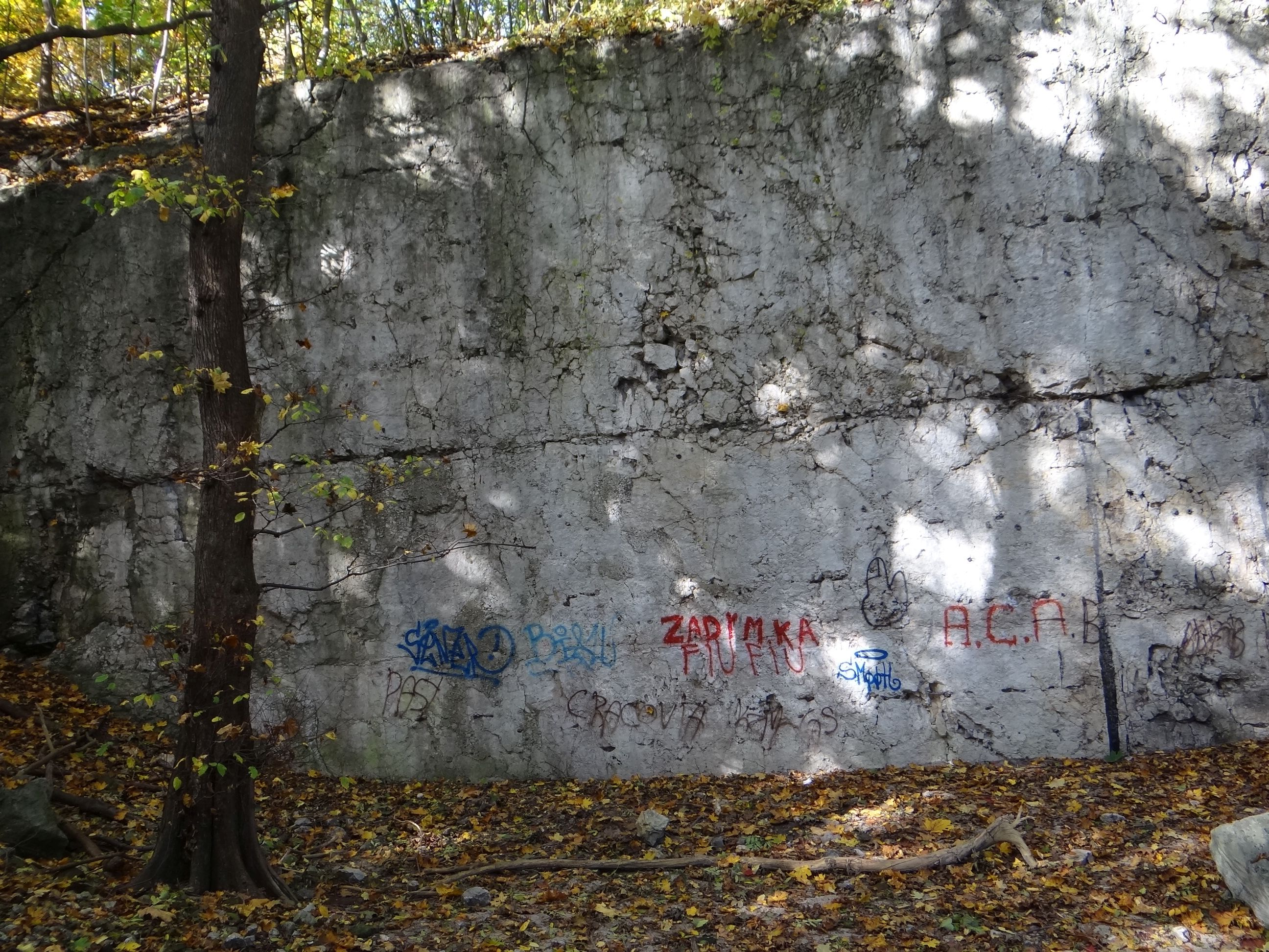 Mur skalny "Esteci" w dawnym kamieniołomie pod św. Benedyktem na Krzemionkach Podgórskich w Krakowie